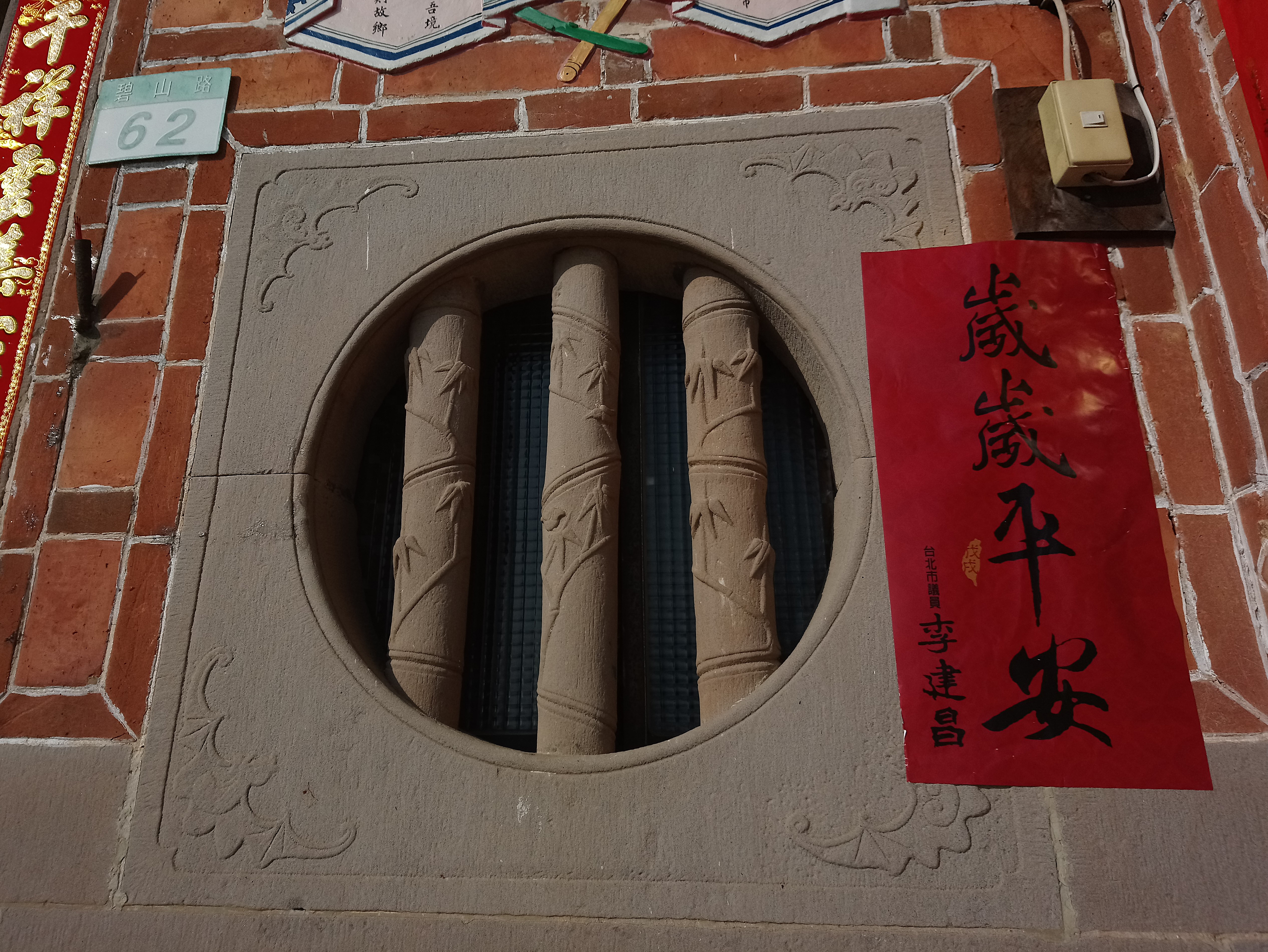 石崁黃氏古宅圓窗,台北市內湖區金龍次分區碧山里